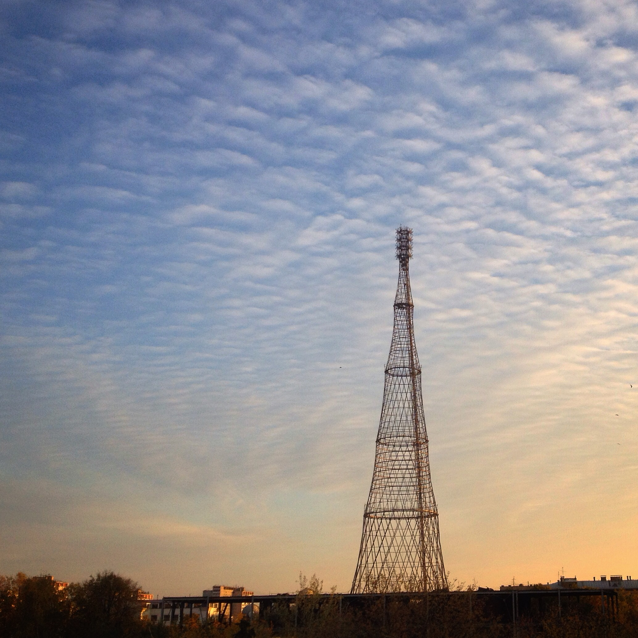 Радио-башня: Донской, Южный округ, Москва